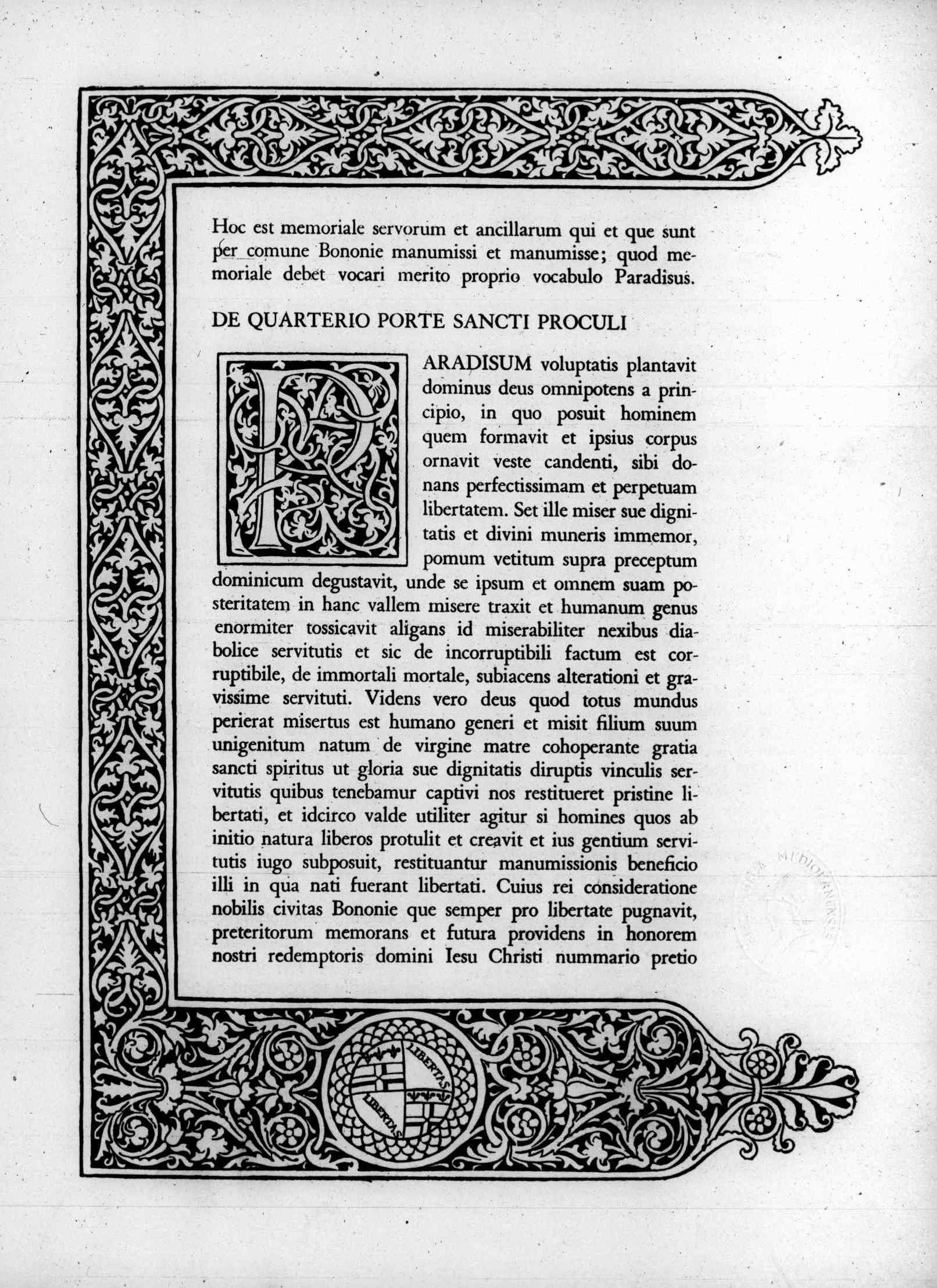 pagina5